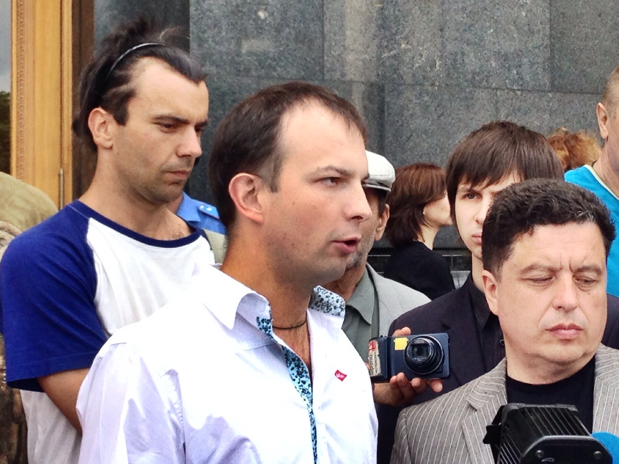 Егор Соболев возле администрации президента